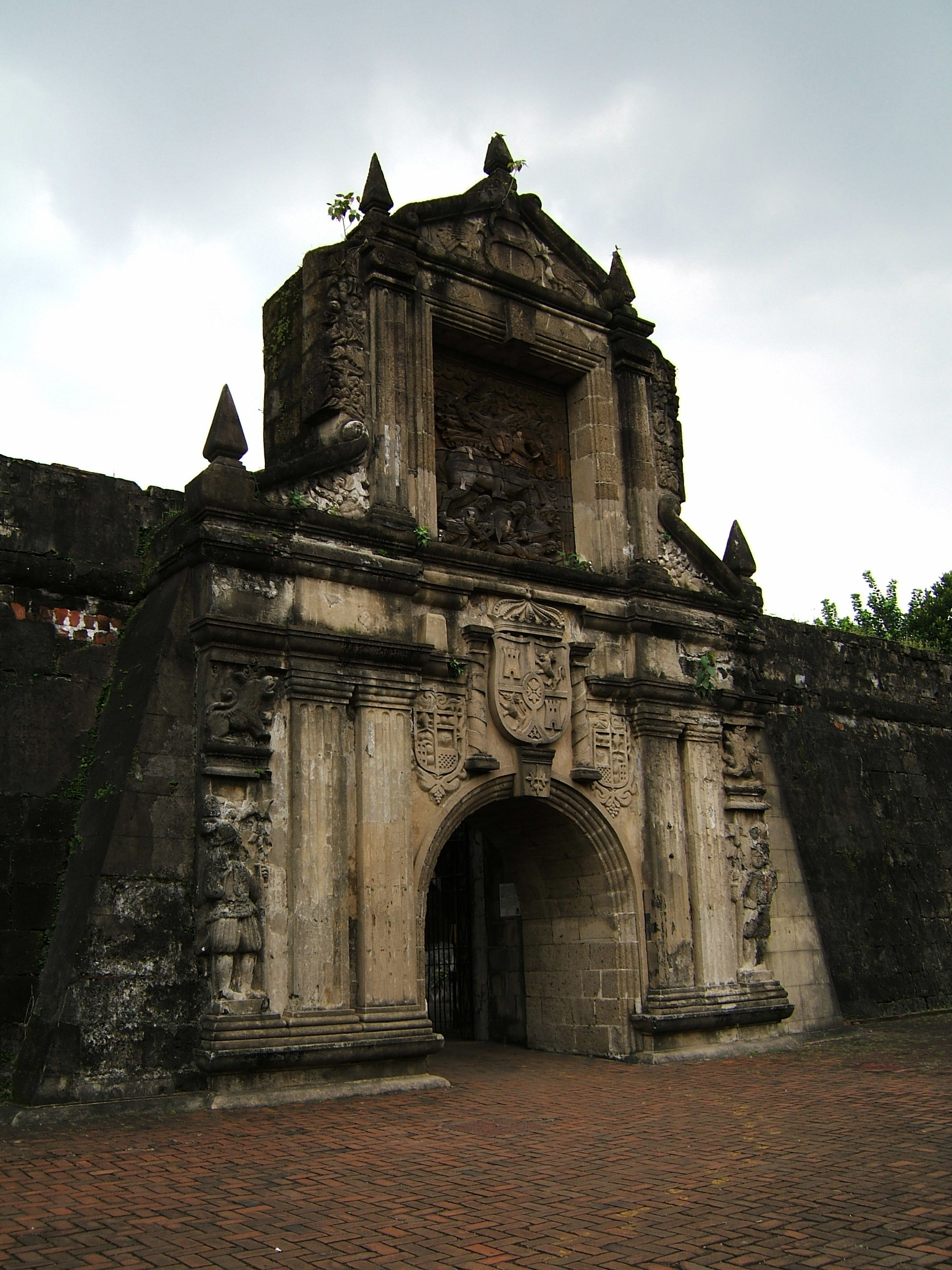 Fort Santiago-Manila, Intromuros